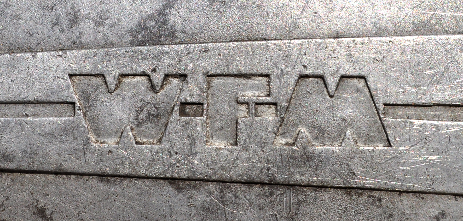 Logotyp Warszawskiej Fabryki Motocykli odlewany na pokrywie prądnicy silnika motocyklowego w 1964 roku.